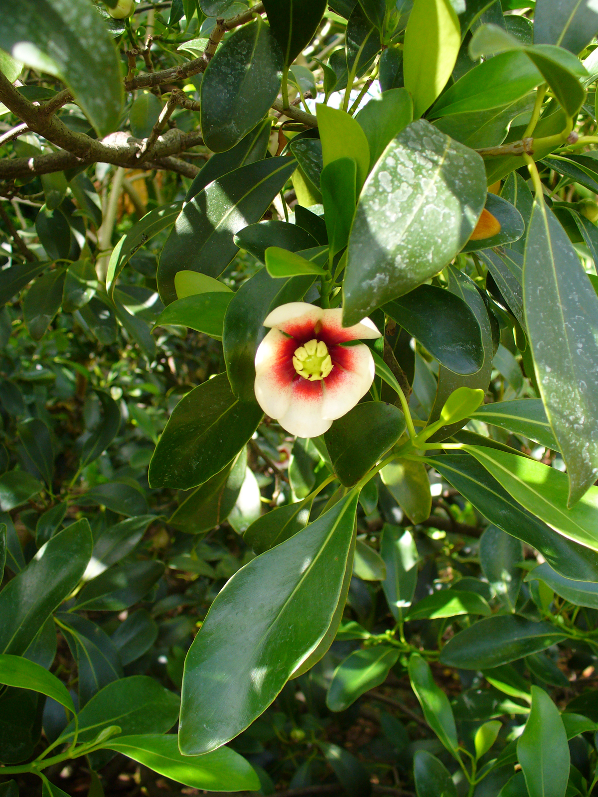 Clusia lanceolata Fairchild Tropical Botanic Garden, Miami, Florida, USA